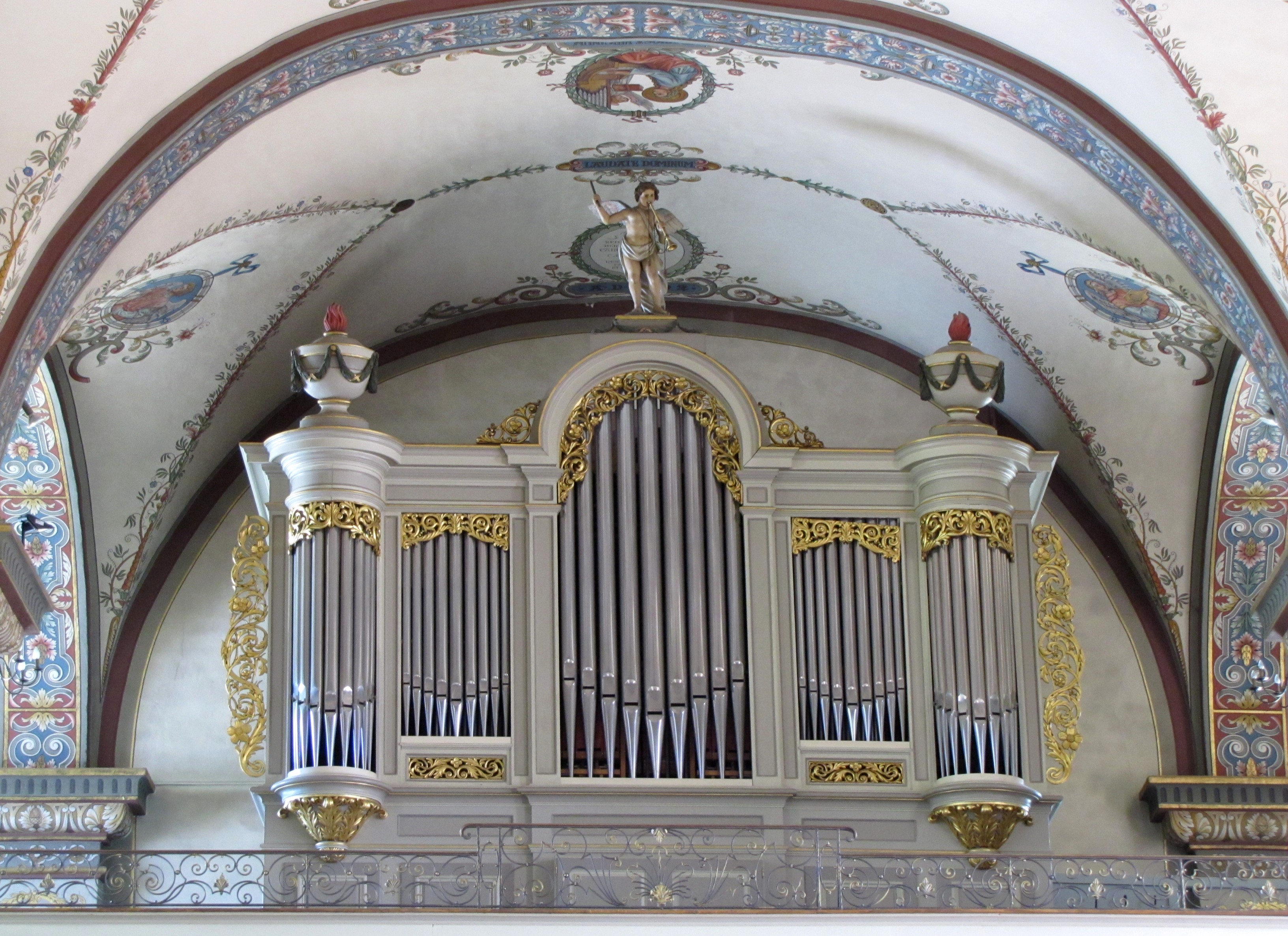 Alsace, Haut-Rhin, Jungholtz, Basilique Notre-Dame (1723) de Thierenbach (PA00085469, IA00111918).Orgue de tribune Didier-Fischer-Krämer (1923-1992)